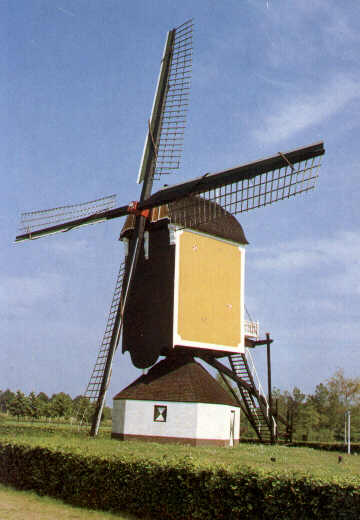 Gesloten standerdmolen te Uden (Foto: Hans de Kroon) Categorie:Afbeelding molen